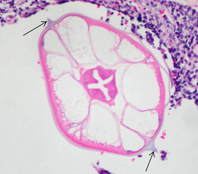 Sectiunea transversala a oxiurului